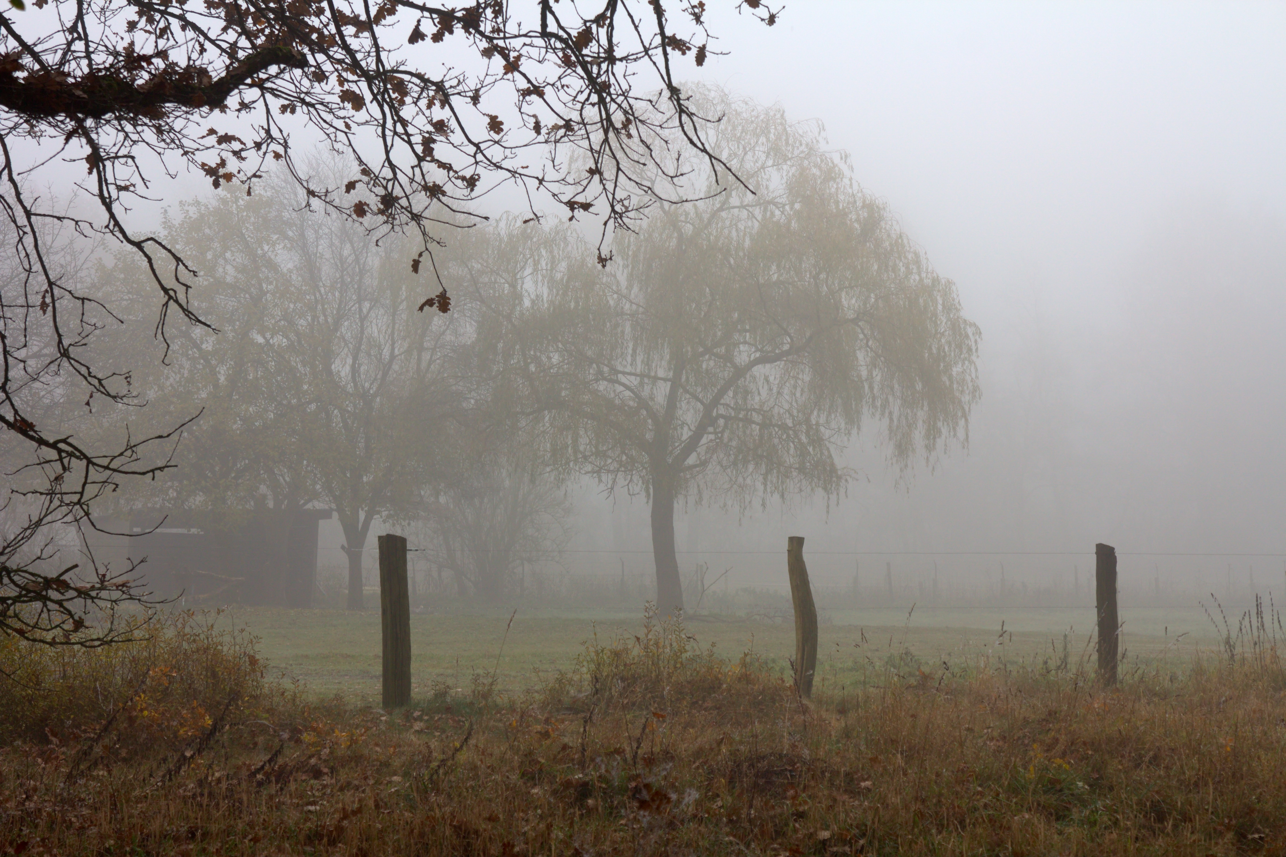 NSG Schwarzes Moor bei Resse, Niedersachsen, Deutschland